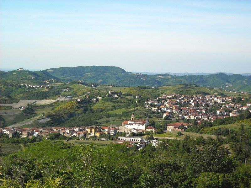 Vista di Bosio (AL).